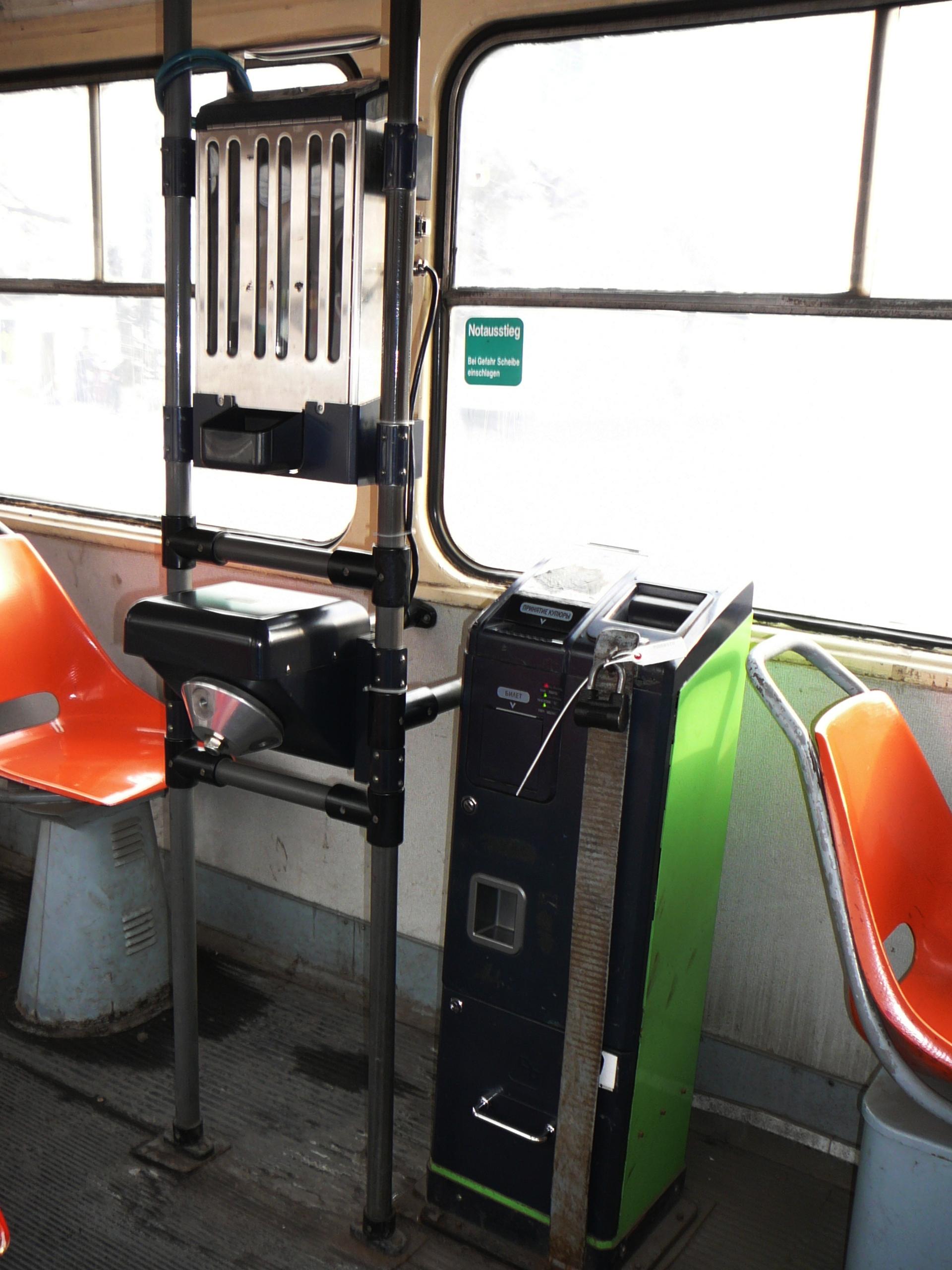 Валидатор в трамвае. Алма-Ата. Напольный блок - устройство для оплаты проезда монетами и выдачи билета.Блок между двух вертикальных стоек - устройство для возвращения сдачи в монетах.